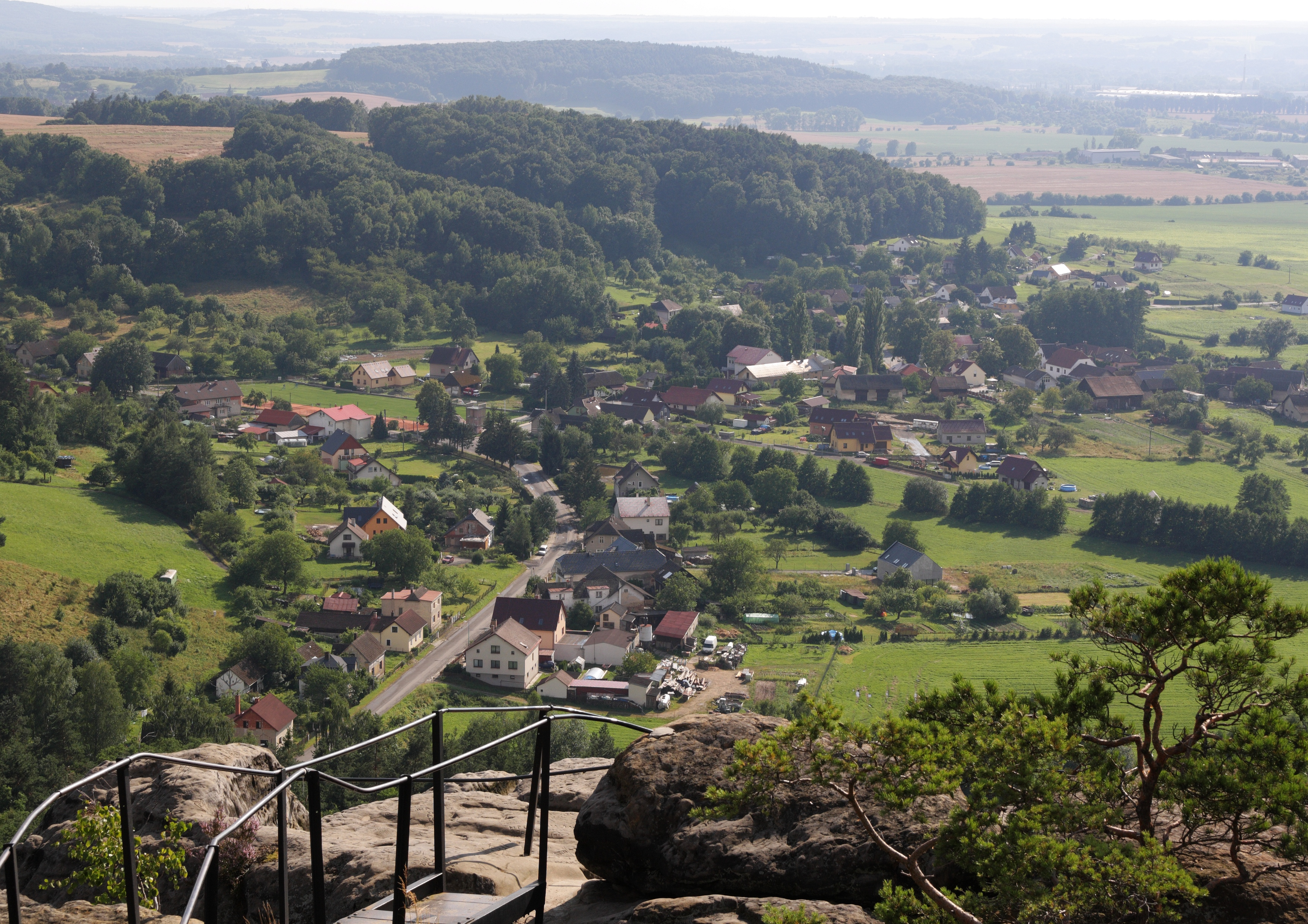 Dneboh - pohled z Drábských světniček.